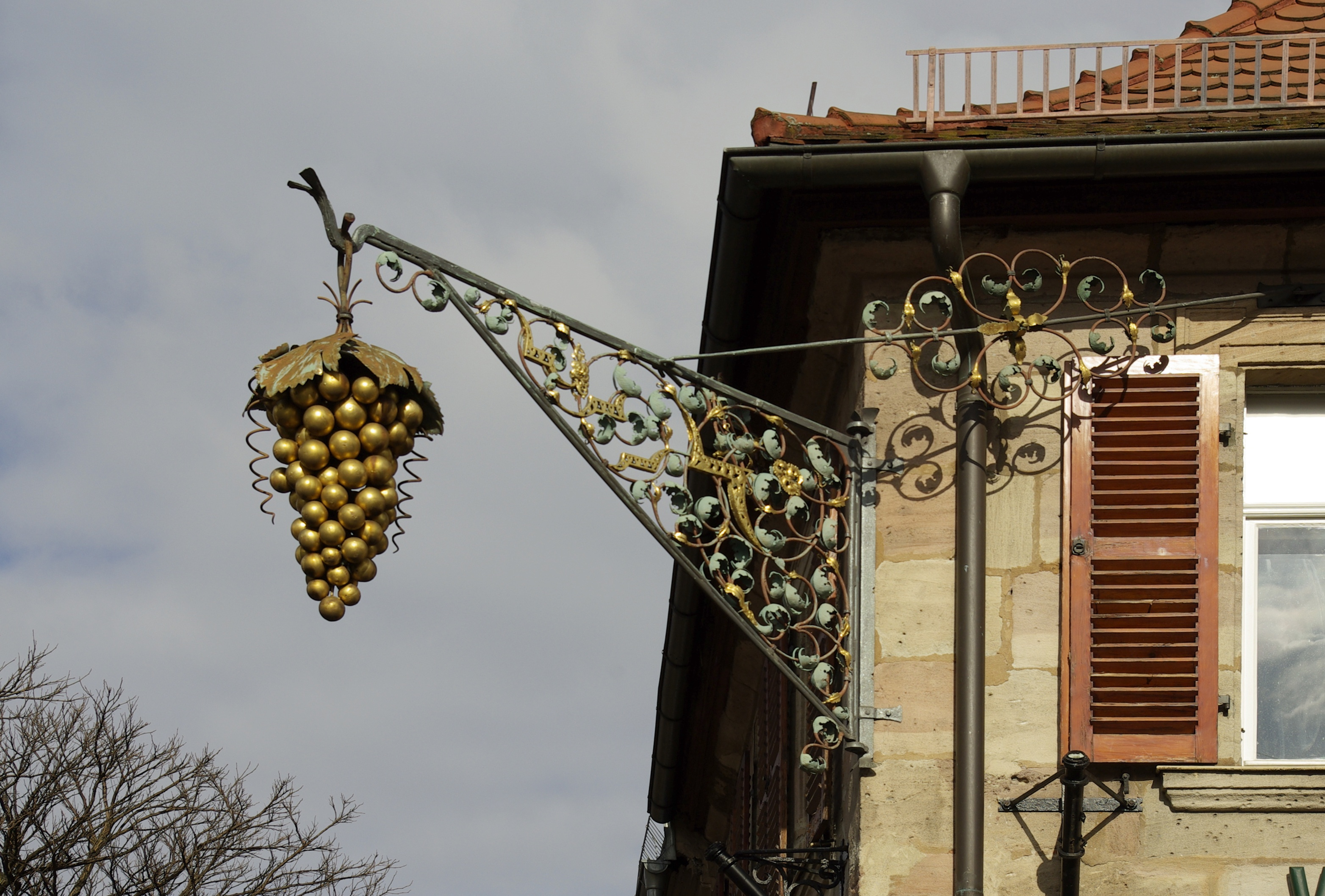 Wirtshausschild der Weinhandlung und Weinstube Kach in der Kirchenstraße 2 in Erlangen.